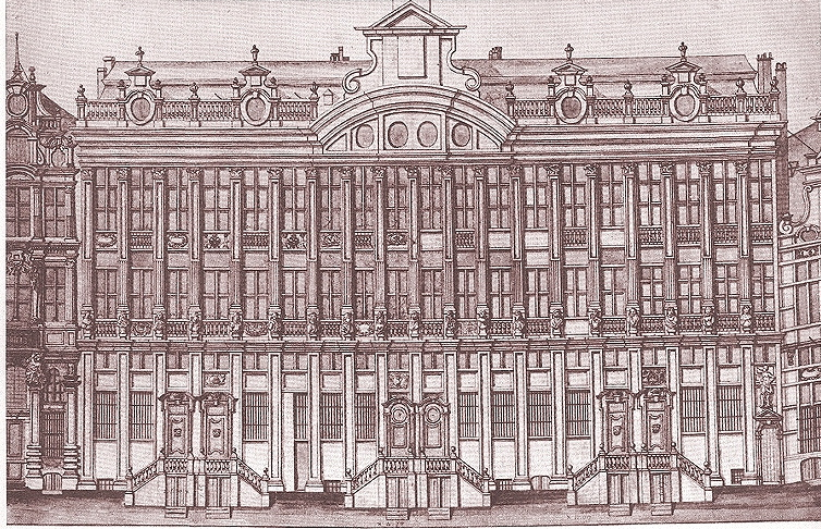 Maisons de la Grand-Place de Bruxelles, dessin par F.J. De Rons. Maison des ducs de Brabant, groupe de sept maisons reunies derrière une façades unique